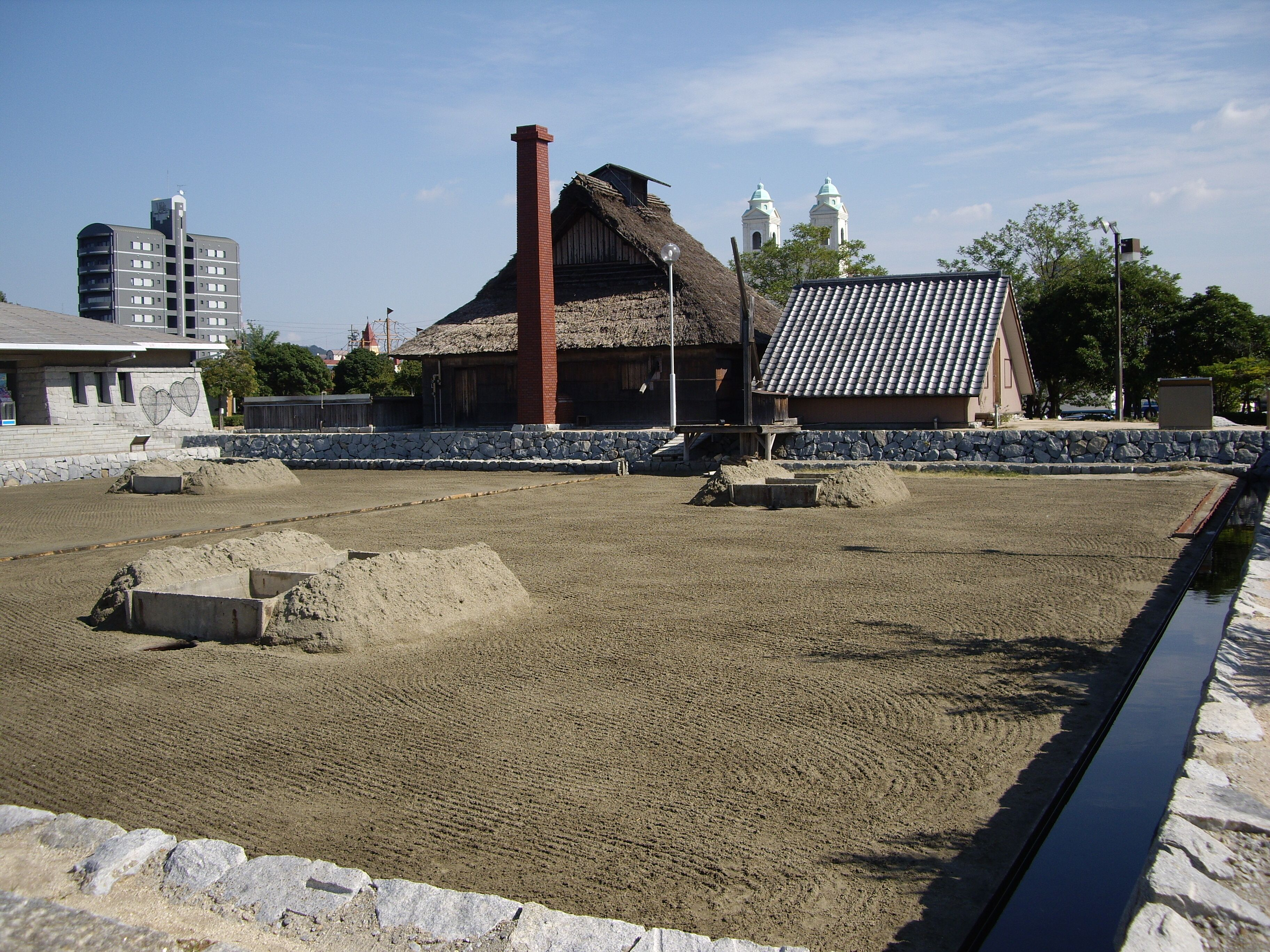 塩田（釜屋、濃縮台、沼井台など） ： 復元施設で宇多津町産業資料館に隣接する。 - 日本国香川県宇多津町（うたづ臨海公園）。